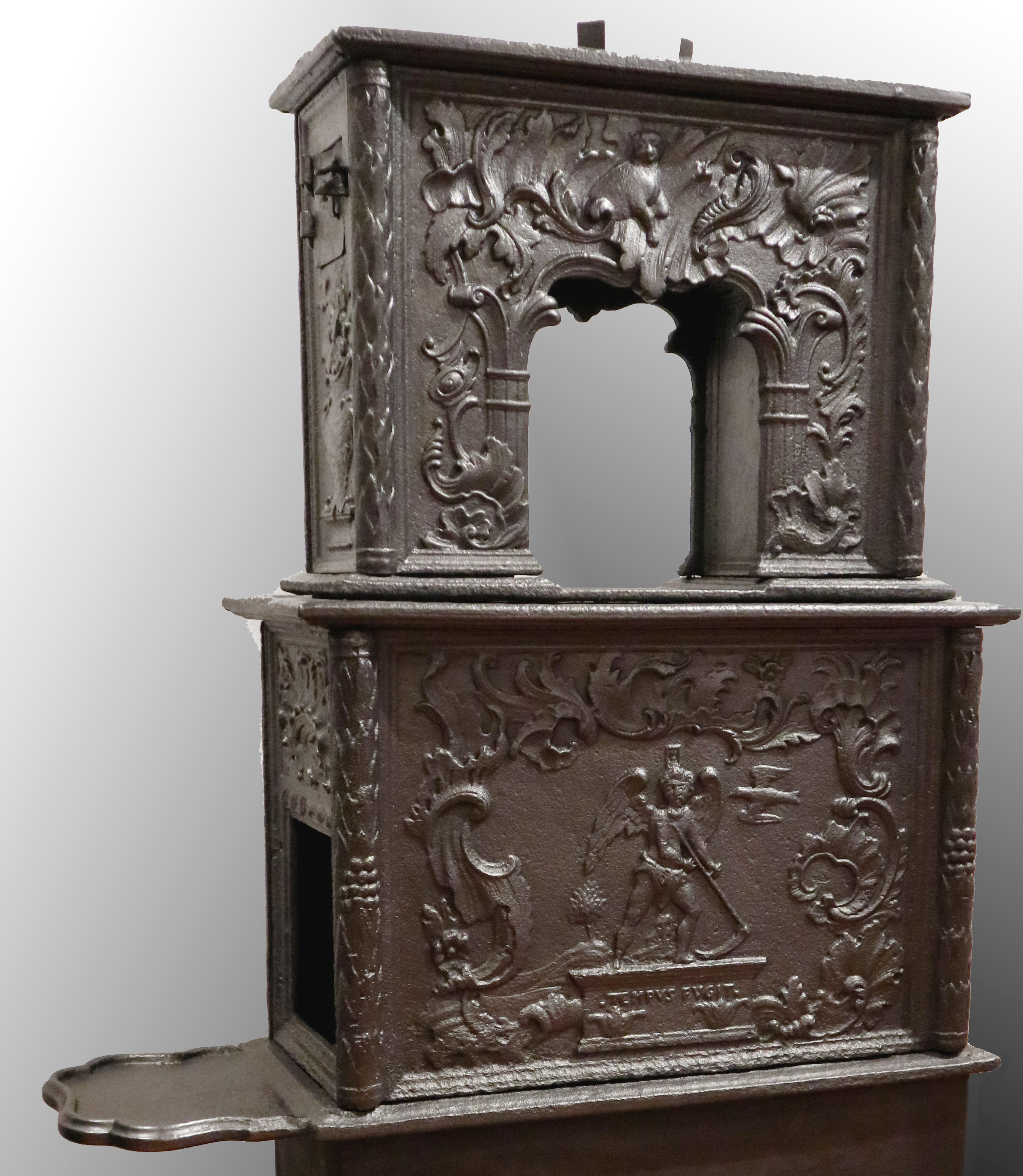 Ole Nielsen Weierholts første selvstendige ovnsmotiv. Produsert av Næs Jernverk